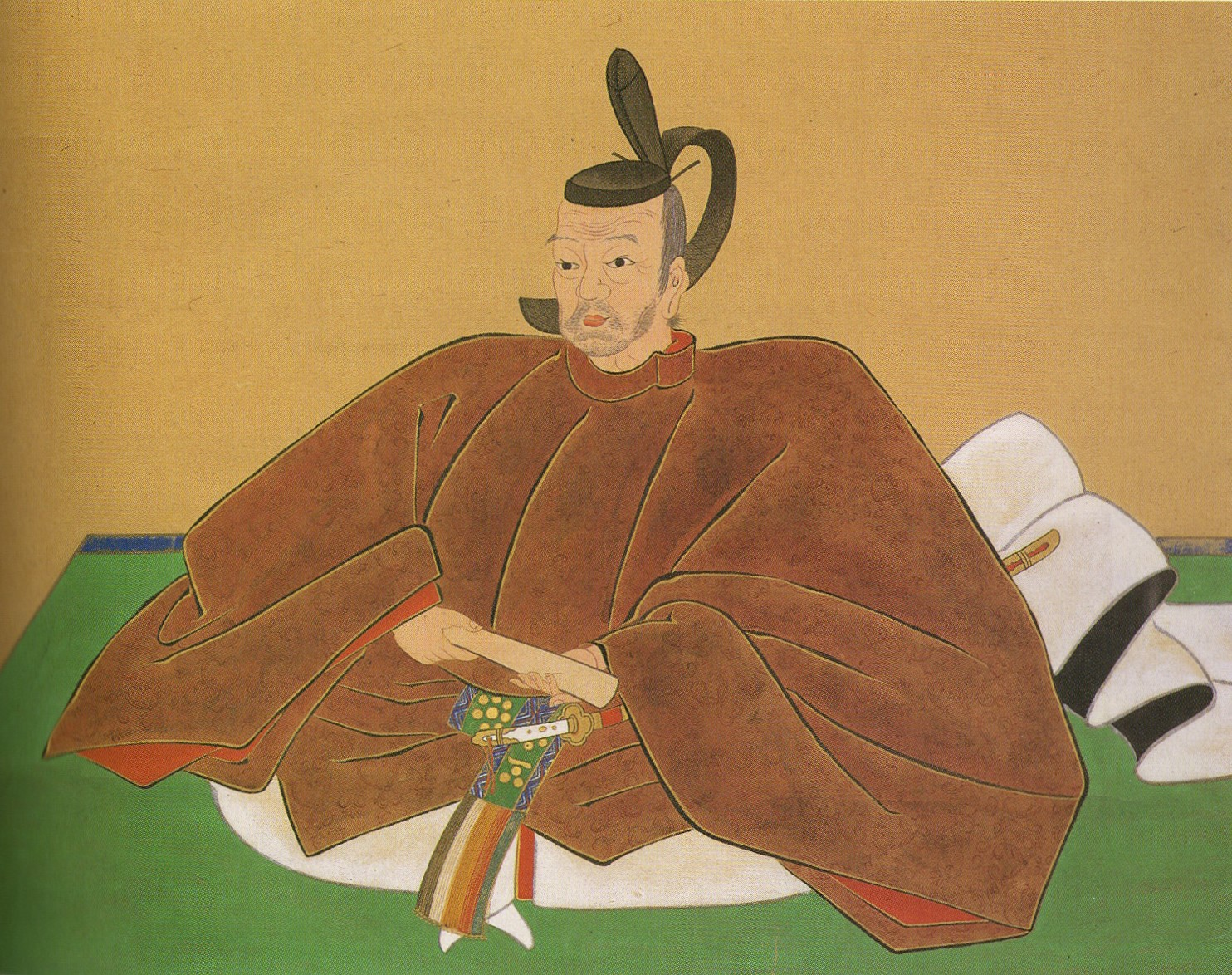 徳山藩初代藩主・毛利就隆の肖像画。